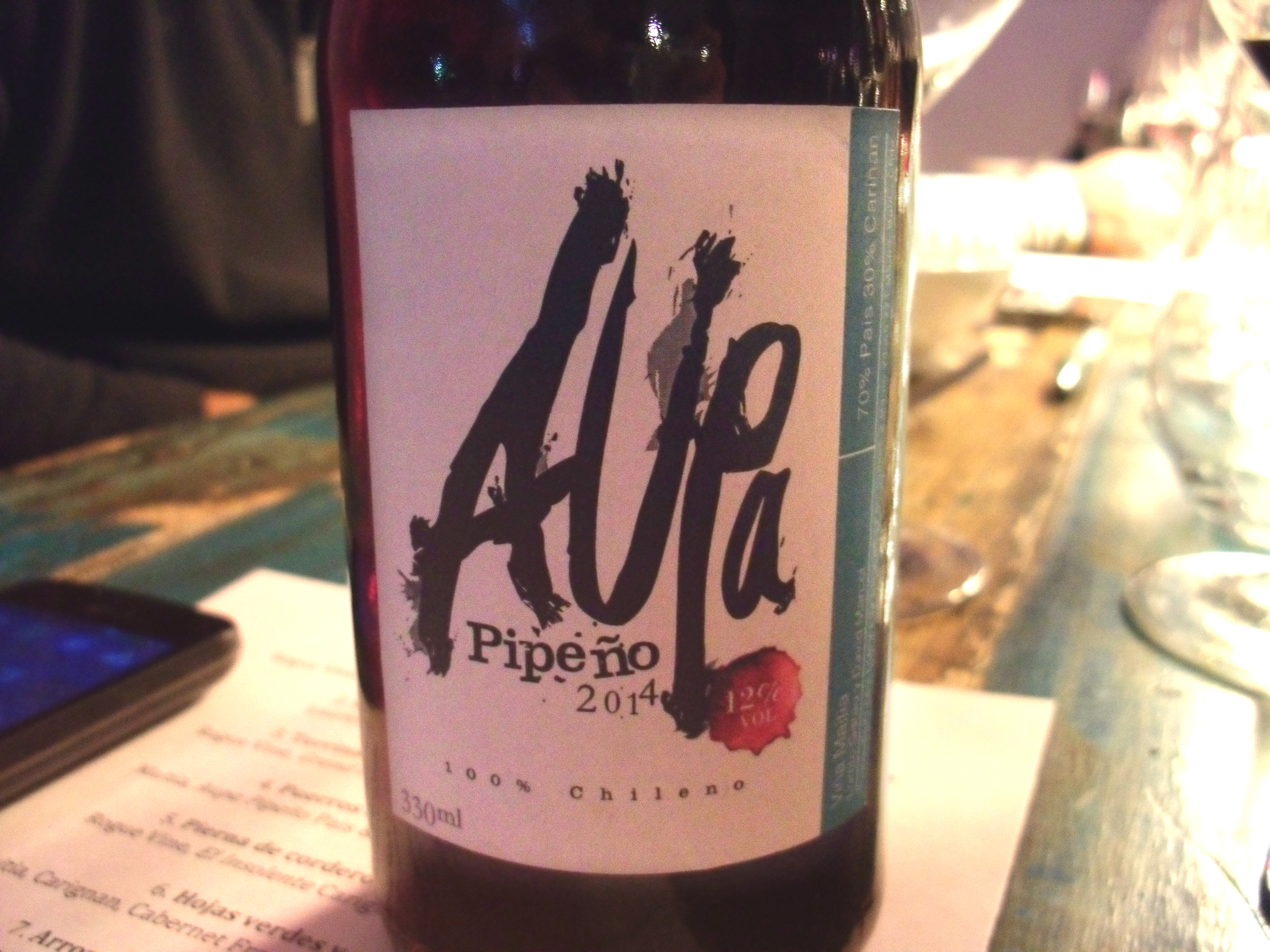 Vino Pipeño Aupa, Viña Maitia, del productor David Marcel.